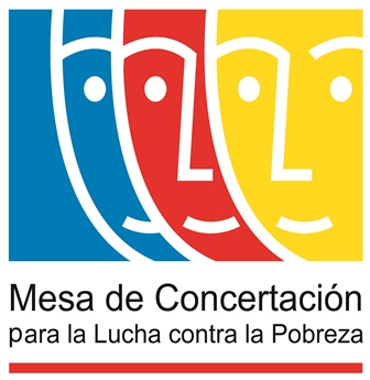 Logo oficial de la Mesa de Concertación para la Lucha contra la Pobreza - Perú